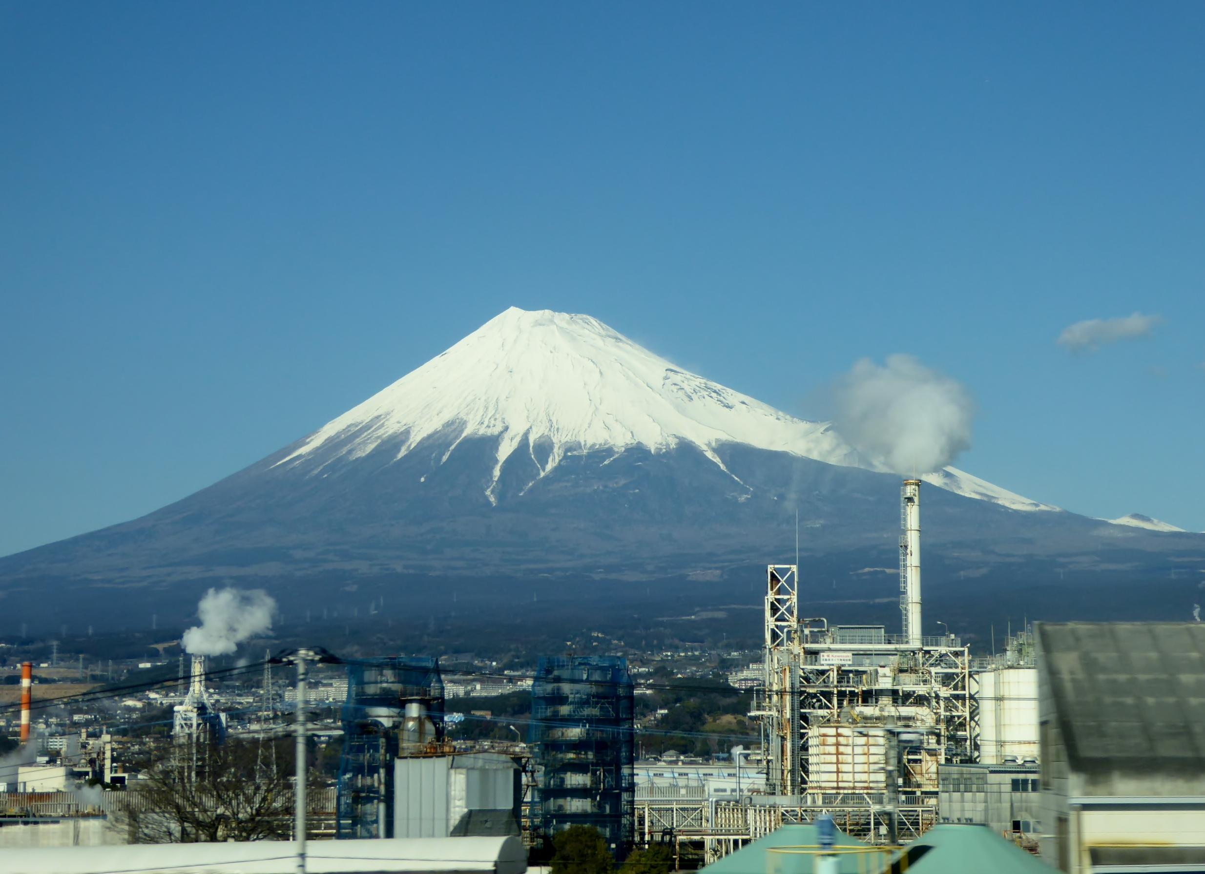 2016年2月8日時点の富士山を撮影。